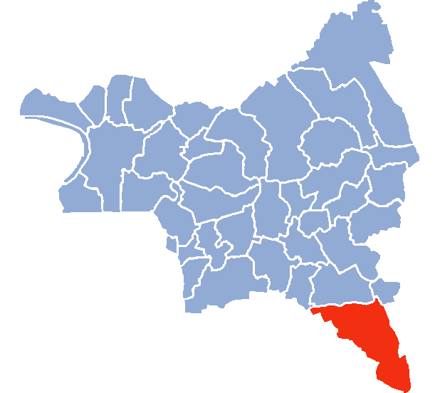 Auteur Hervé SUAUDEAU Licensing Catégorie:Cartes de Seine-saint-Denis Catégorie:Noisy-le-Grand